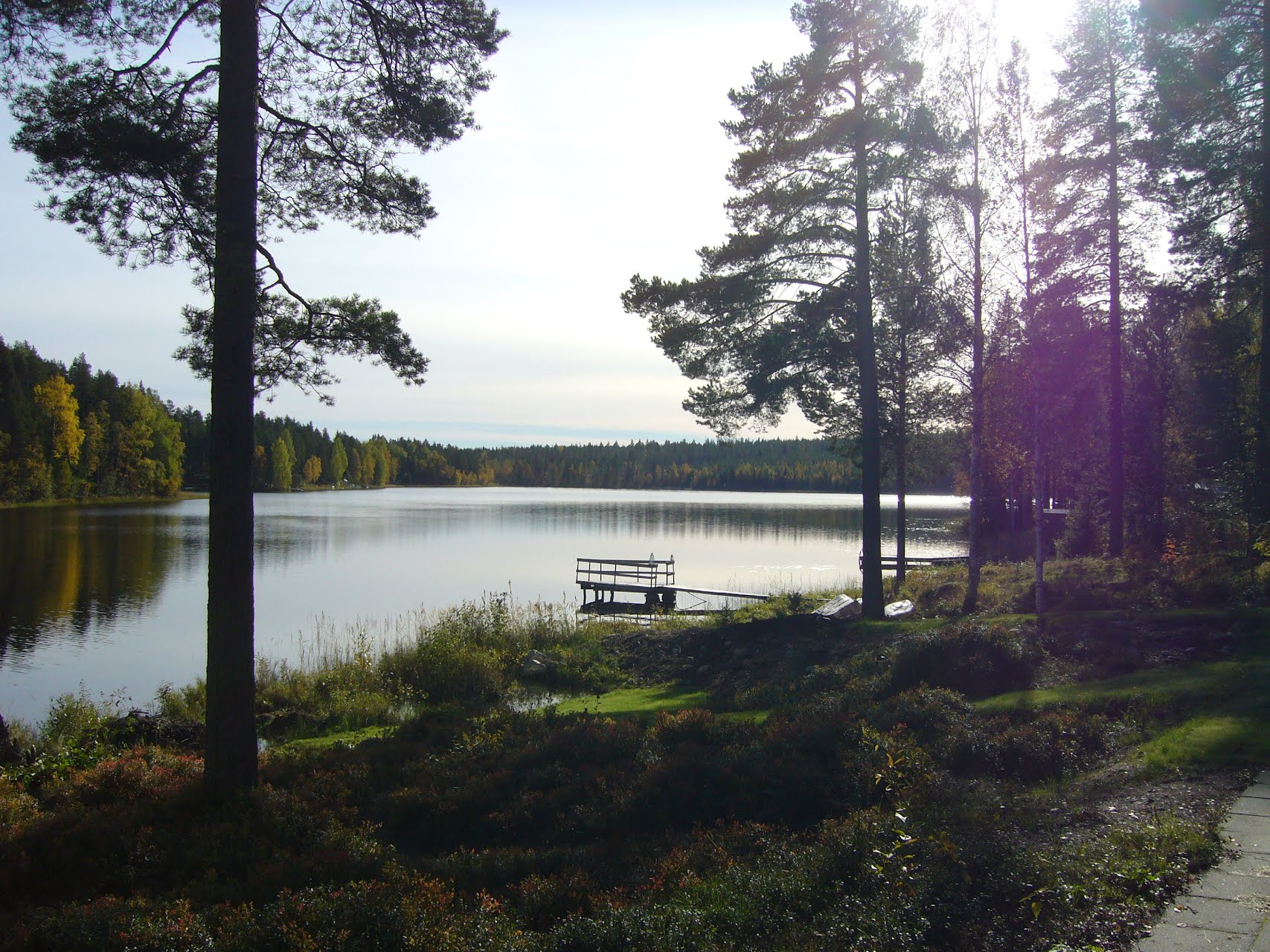 Brygga i Kroksjön